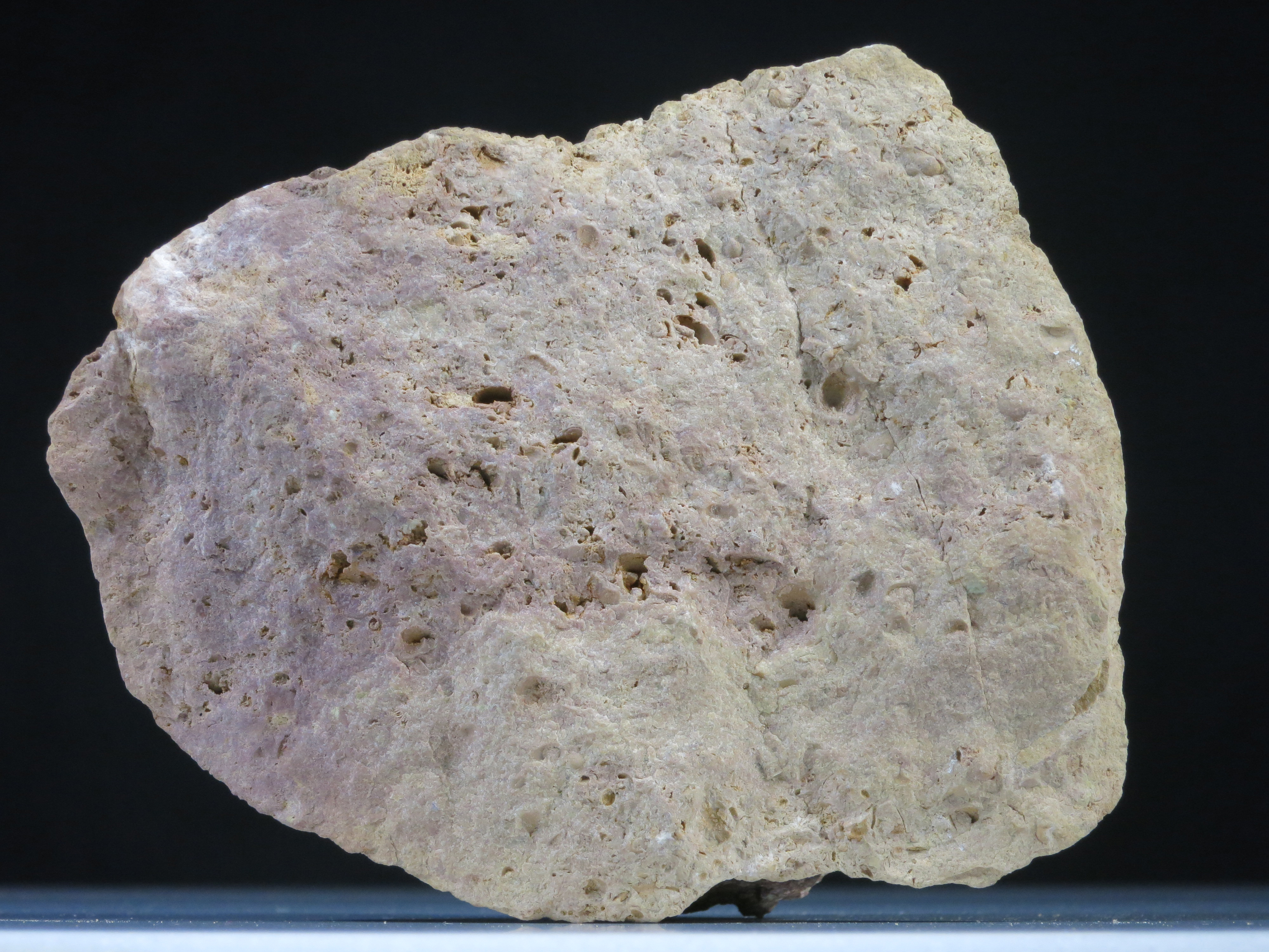 Dolomit; Herkunft: Baltikum Alter: Silur Fundort: Kiesgrube Niederlehme